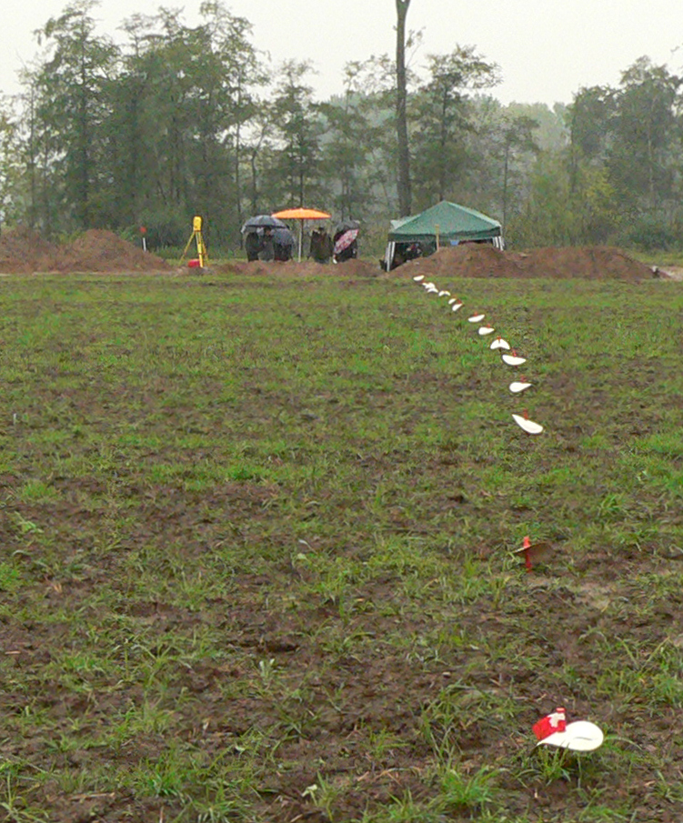 Römisches Marschlager von Wilkenburg, Ausgrabungsfläche und markierter Grabenverlauf